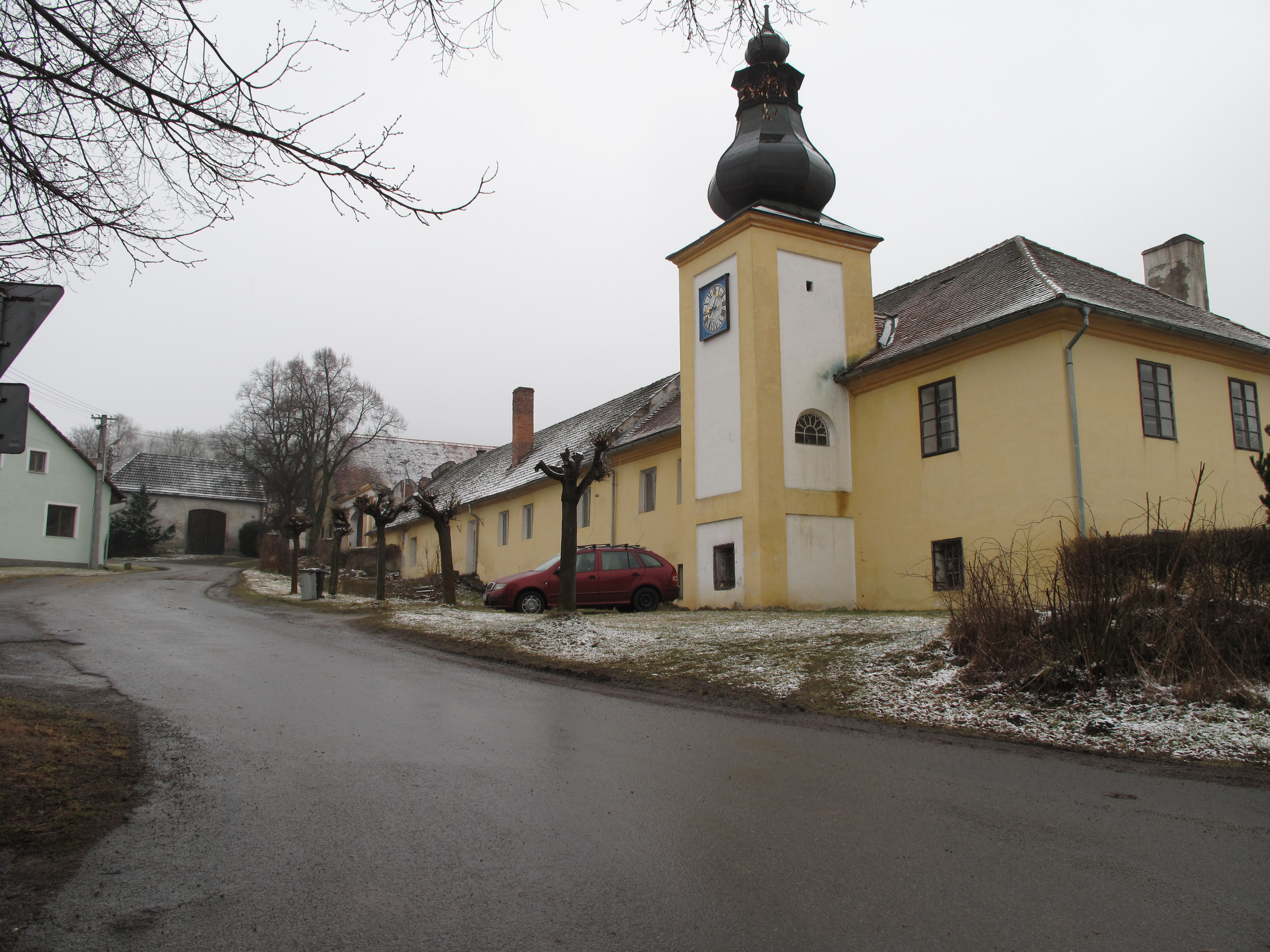 Východní průčelí černětického zámku s věží; okres Strakonice, Česká republika.